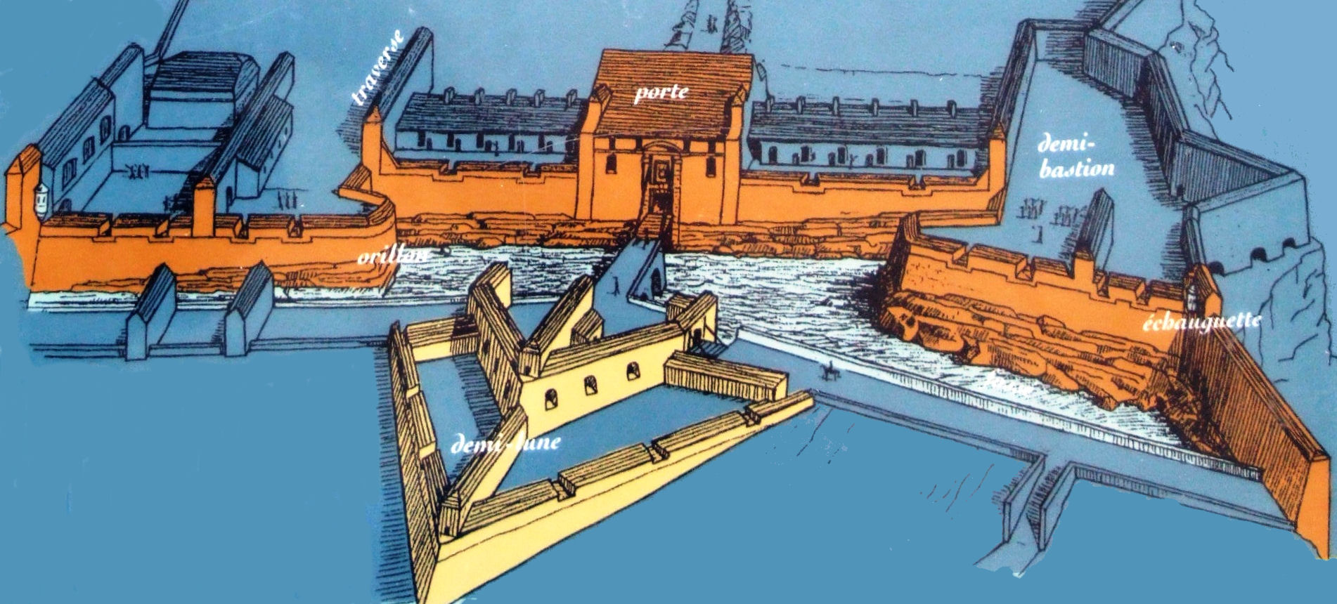 Citadelle de Besançon - Front Saint-Etienne - Demi-lune, bastion à orillons, traverse, échauguette, porte